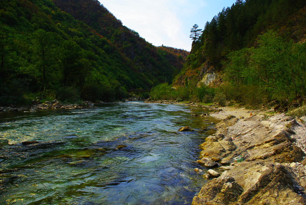 BiH 2012 - Neretva (near Konjic)